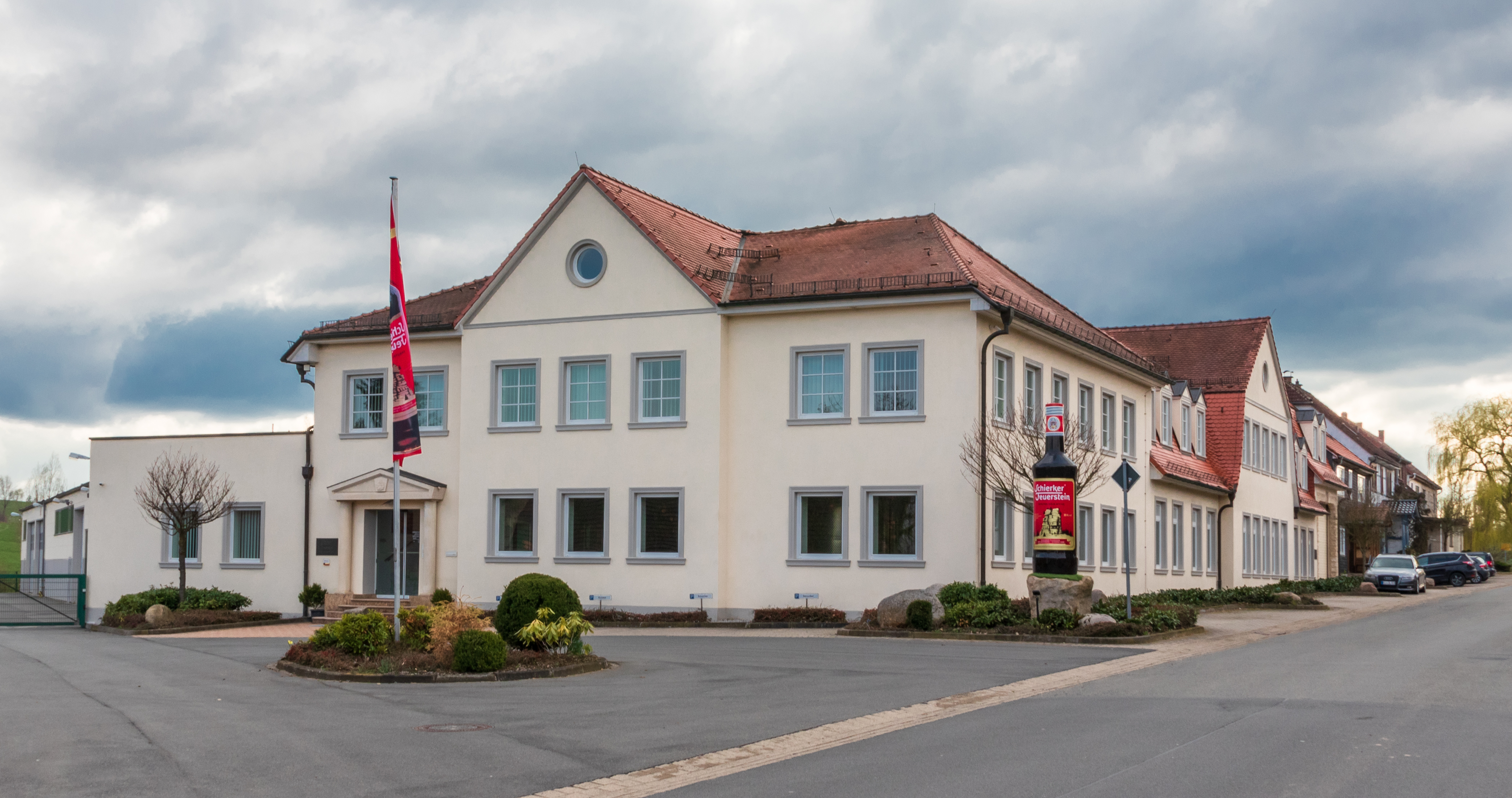 Schierker Feuerstein - Firmengelände in Bad Lauterberg